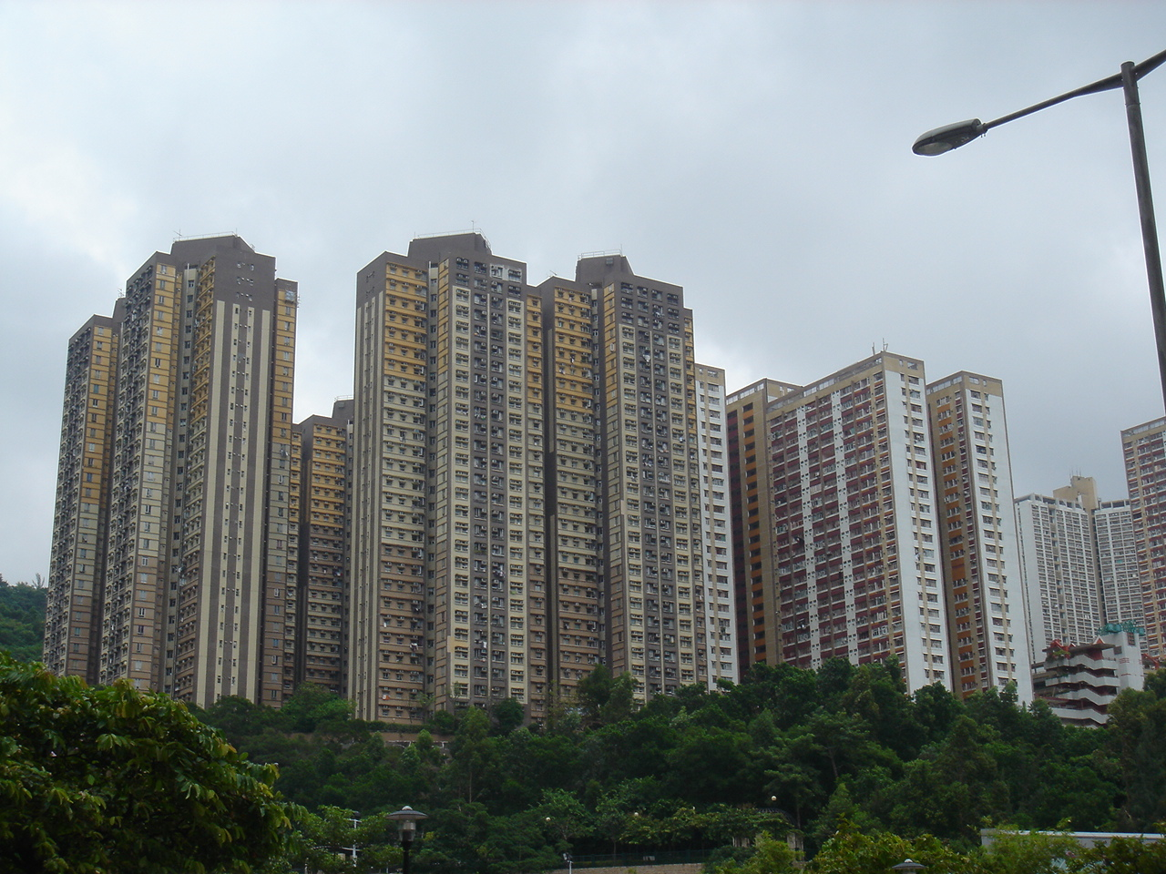 樂雅苑